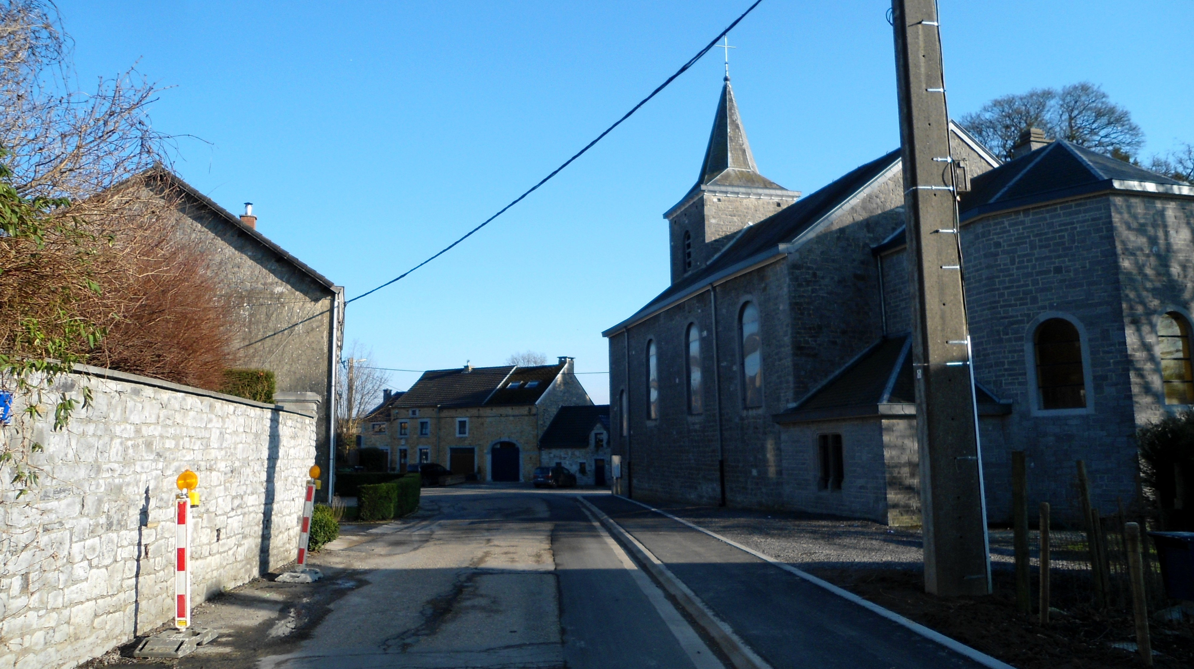 Eglise de Florzé Sprimont